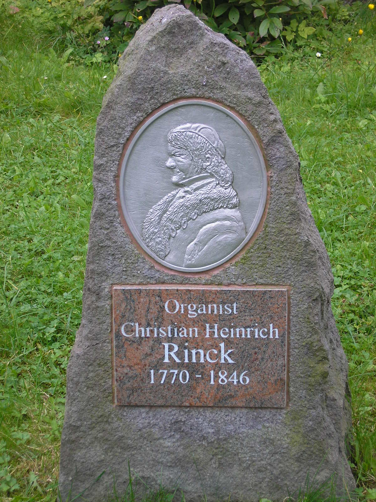 Das Rinckdenkmal (in Erinnerung an Christian Heinrich Rinck) in Elgersburg (Thüringen).